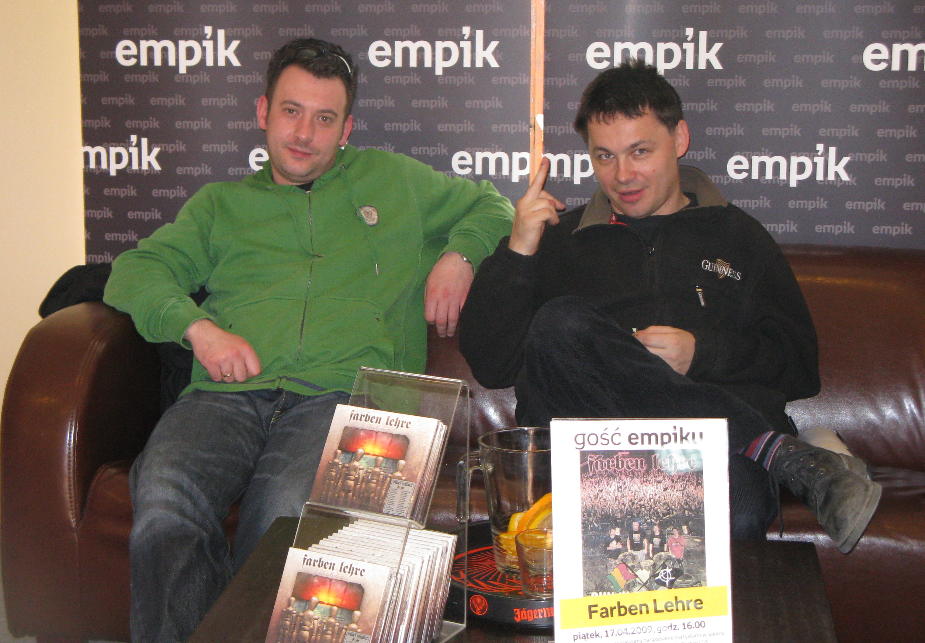 Filip Grodzicki i Wojciech Wojda z zespołu Farben Lehre